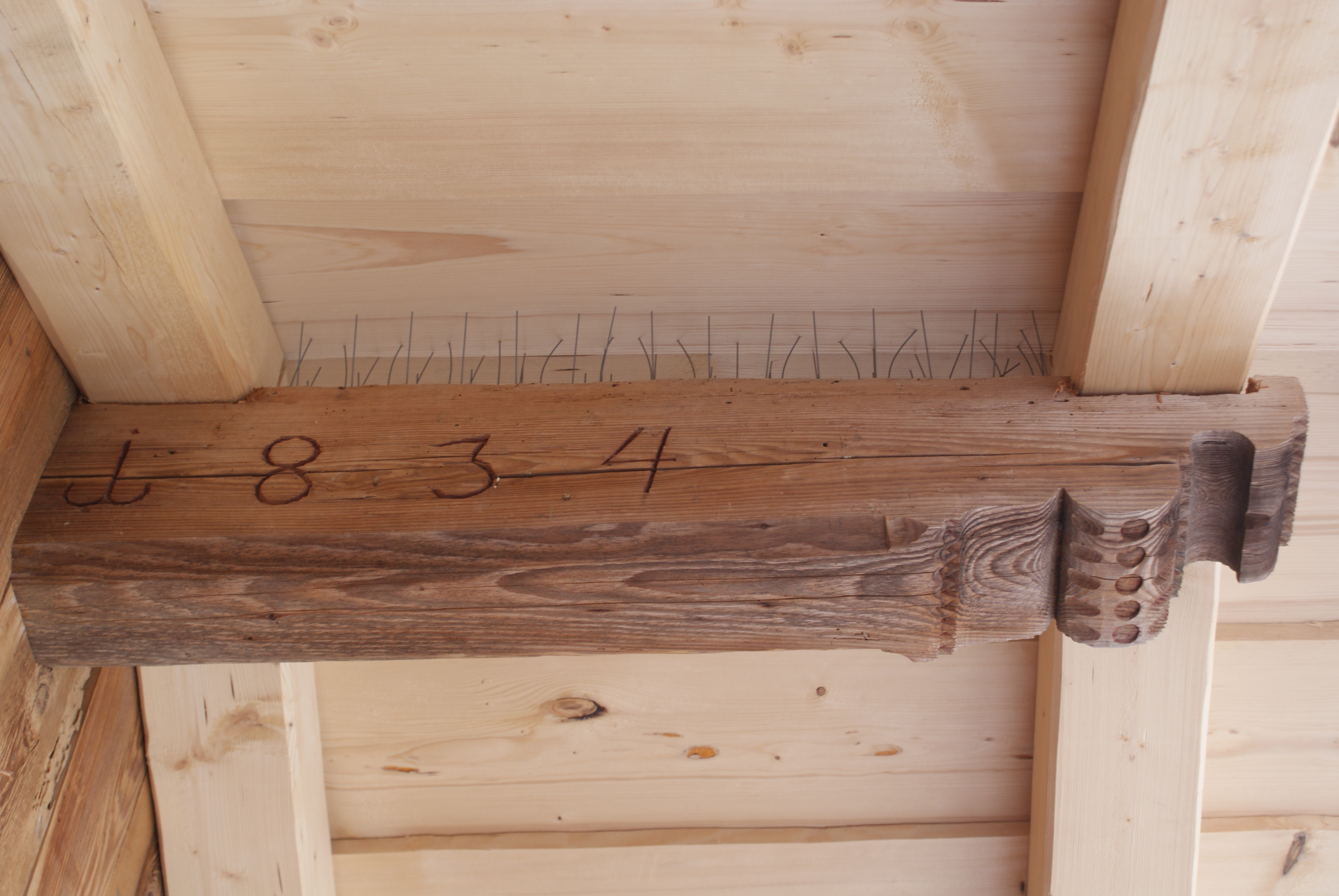 an der südlichen Firstpfette des Moserhofes in Kainerding, Gemeinde Bayerbach